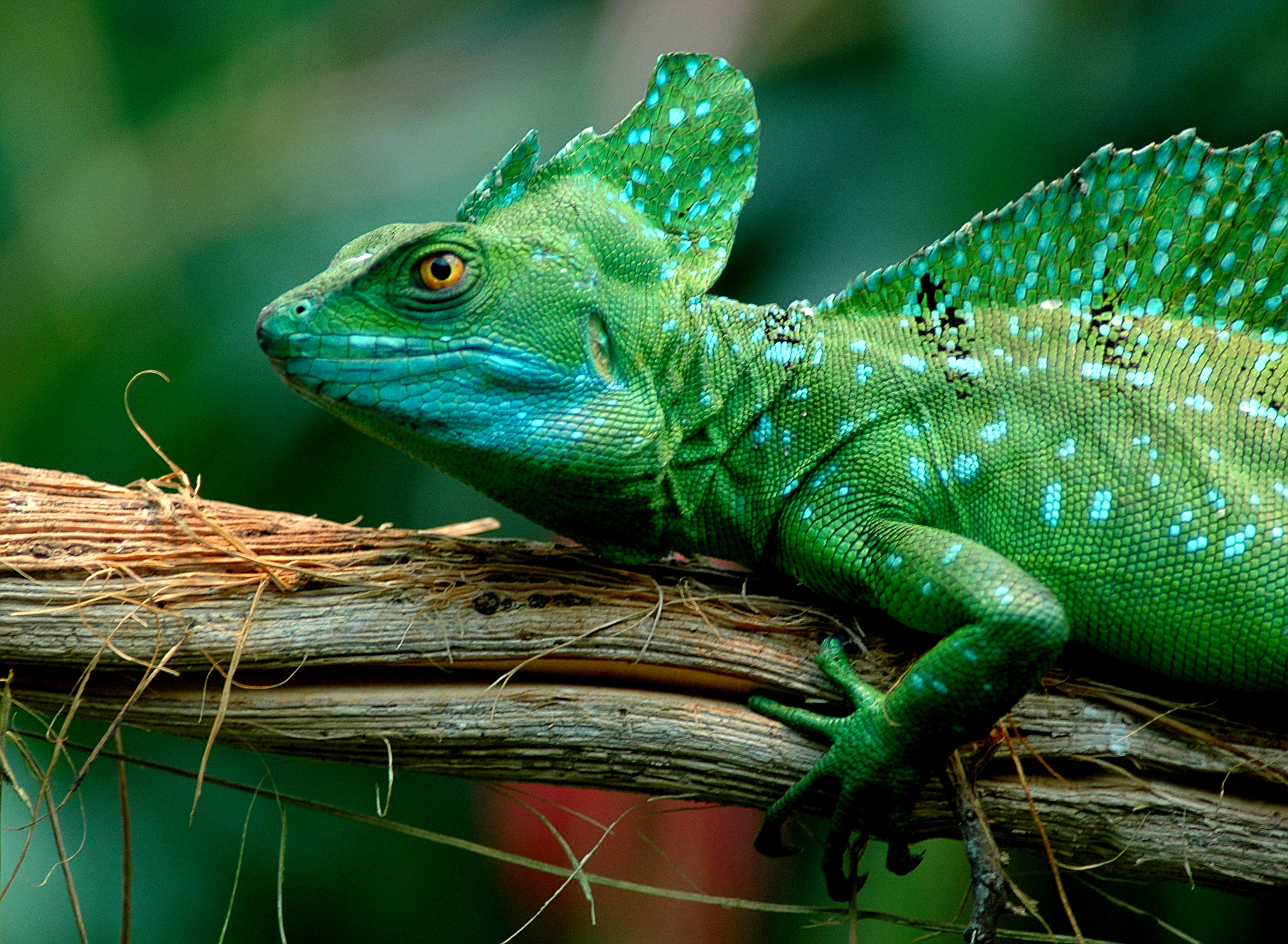 Stirnlappenbasilisk (Basiliscus plumifrons )